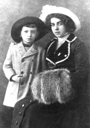 Marie Wagnerová (1887-1934) se synem Viloušem